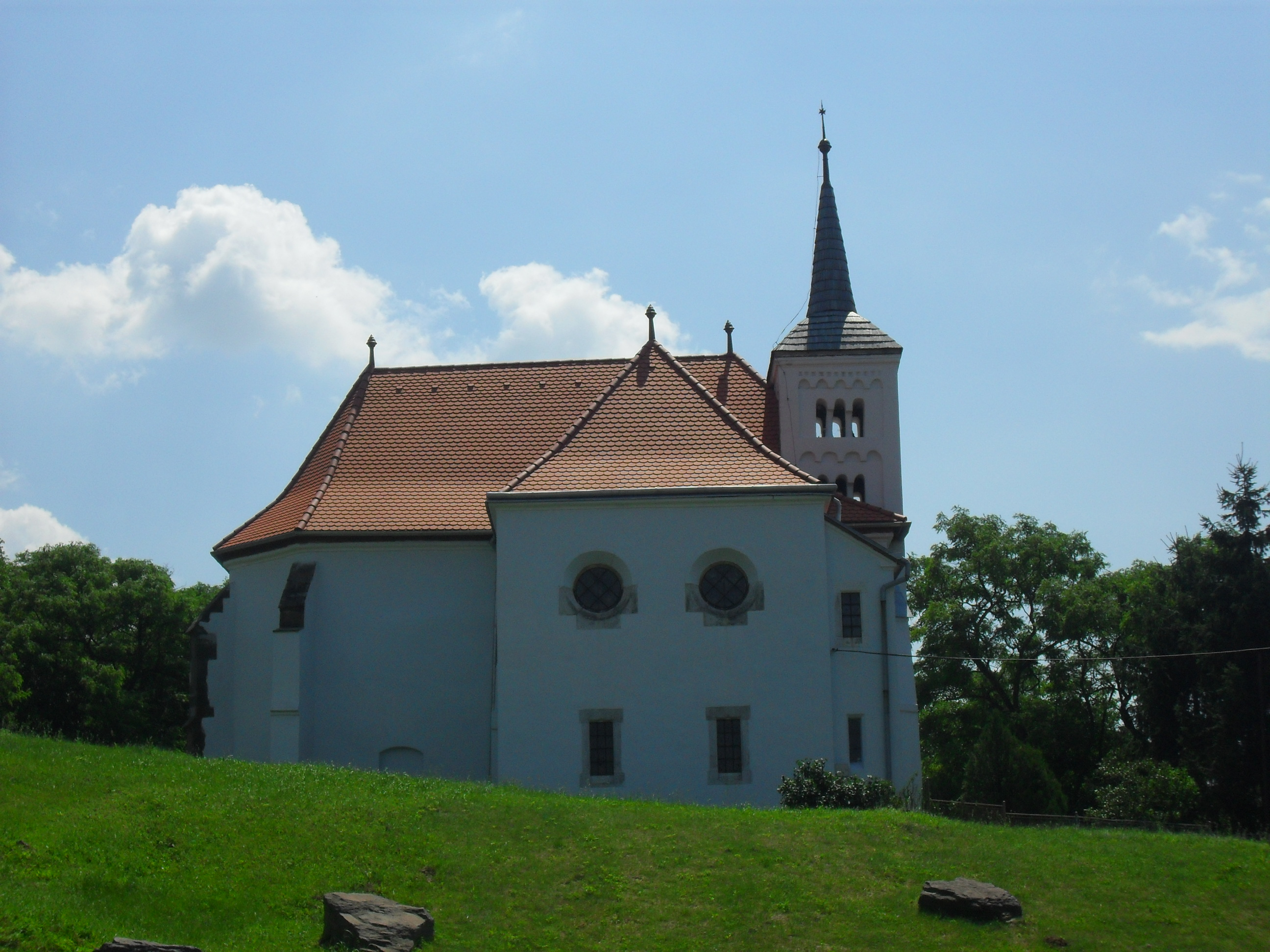 Bodrogszentes - református templom